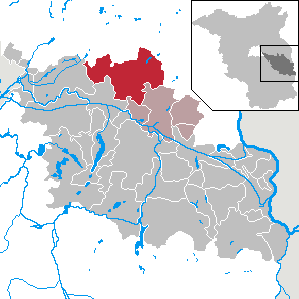 Steinhöfel in Brandenburg (Country) - District Oder-Spree